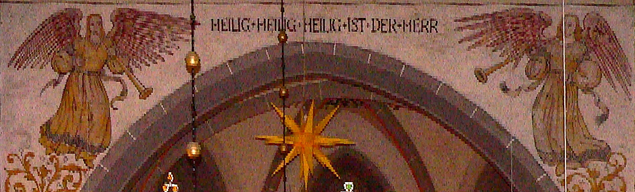 Evangelische Kirche St. Laurentius in Dassel, Niedersachsen, Deutschland - Protestantische Renaissancemalerei (Secco): "Posaunenengel" von 1577